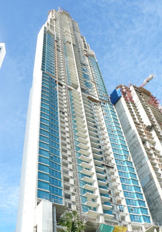 Ocean Two, O2